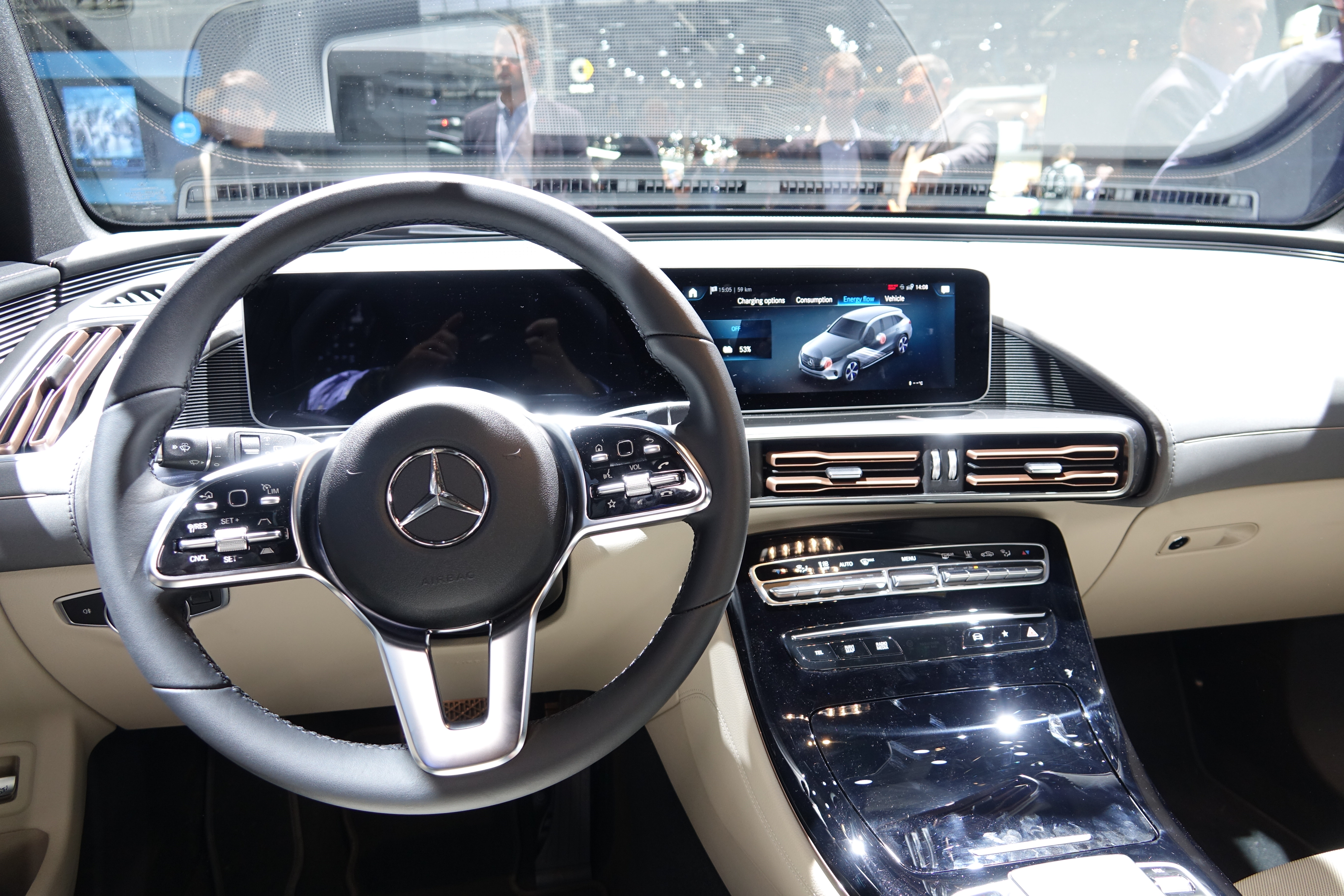 Mercedes-Benz EQC au Mondial Paris Motor Show 2018